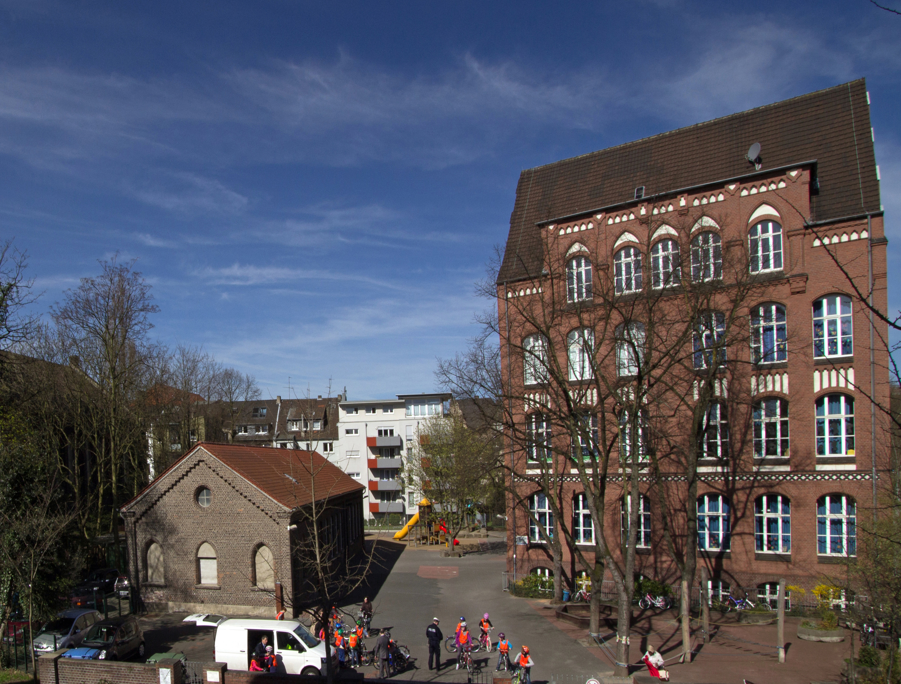 Adolf-Feld-Schule Oberhausen: Anbau des ersten Schulgebäudes (1857) und neues Gebäude (1901/1909)